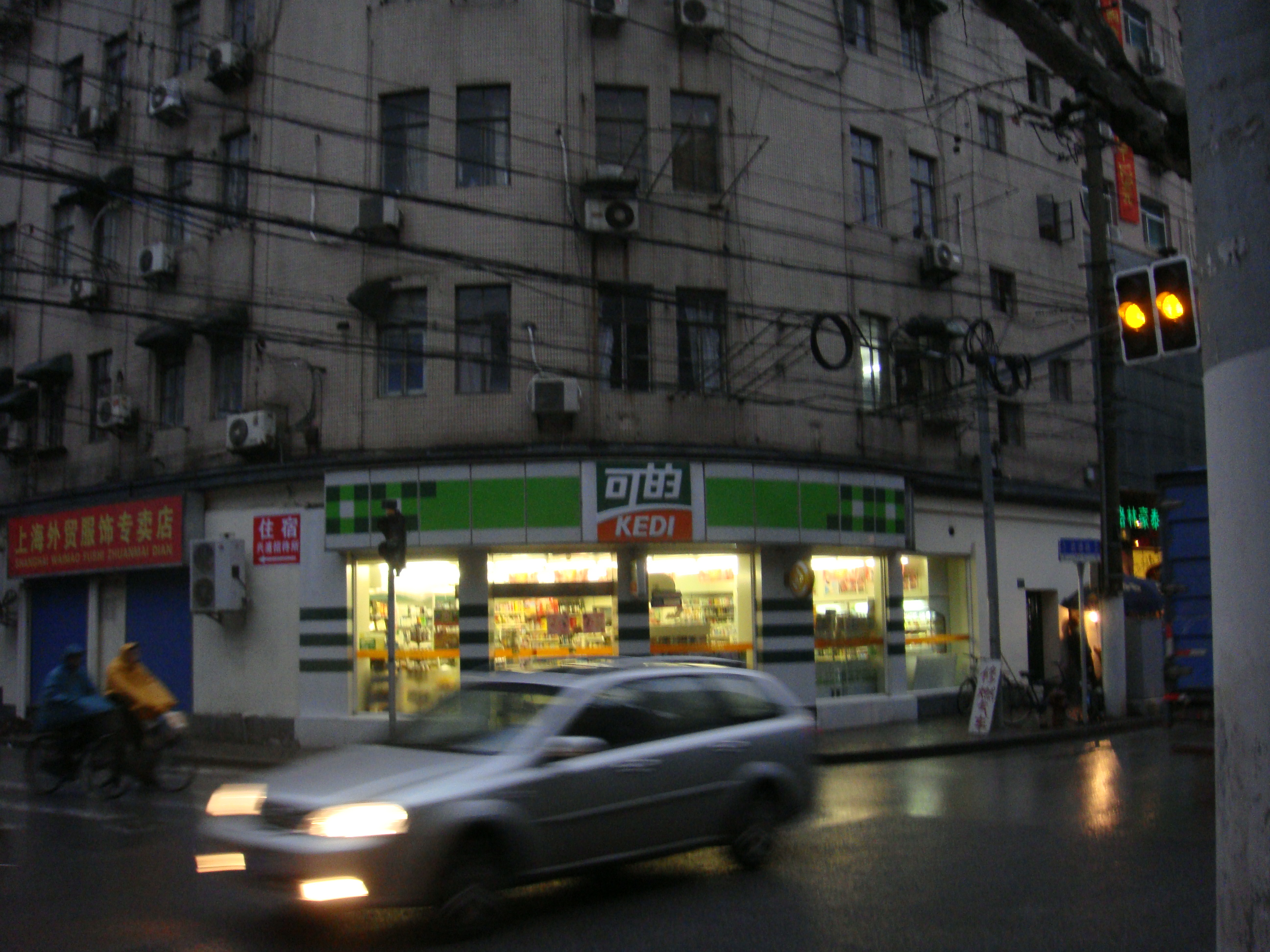 中文（中国大陆）: 武进路乍浦路口